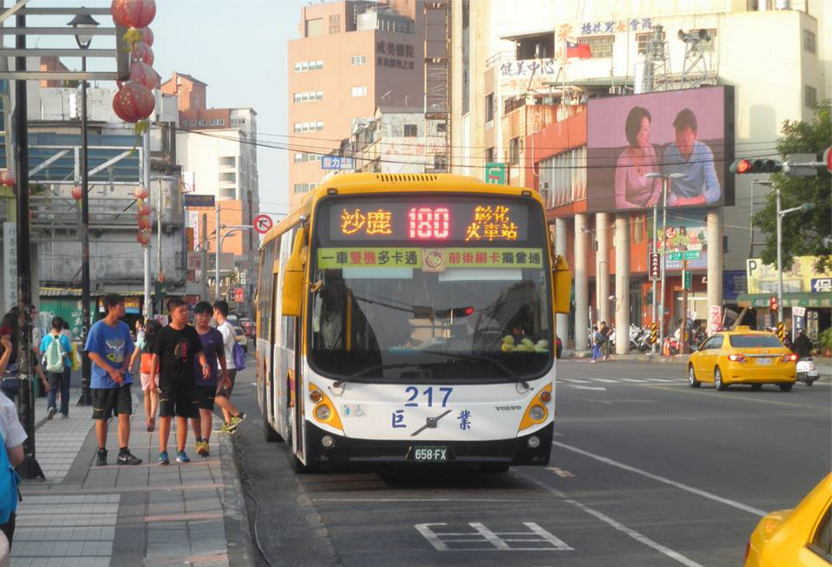 巨業交通658-FX 2012 B7RLE Low Entry 台中市公車180路